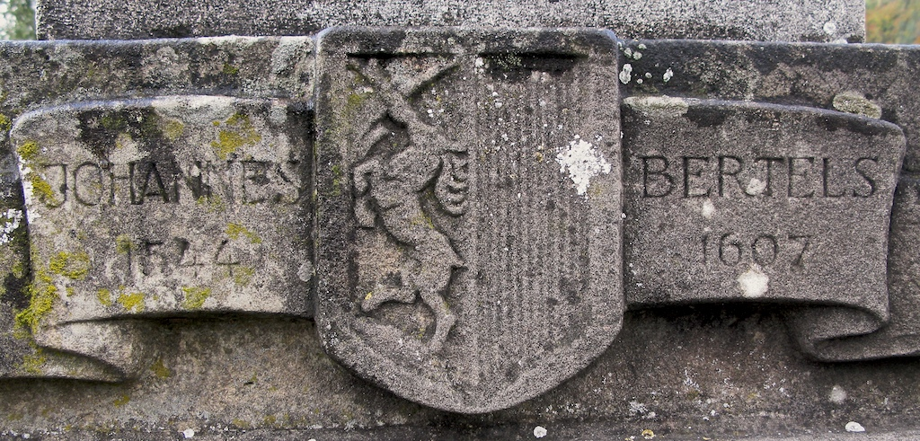 Dem Bertels säi Wopen um Sockel vun der Statu op der aler Sauerbréck.